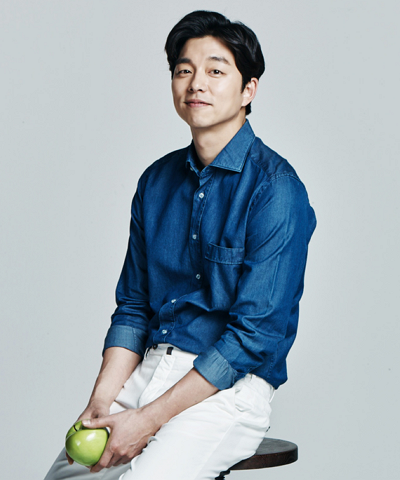 Gong Yoo (Oct 2019)